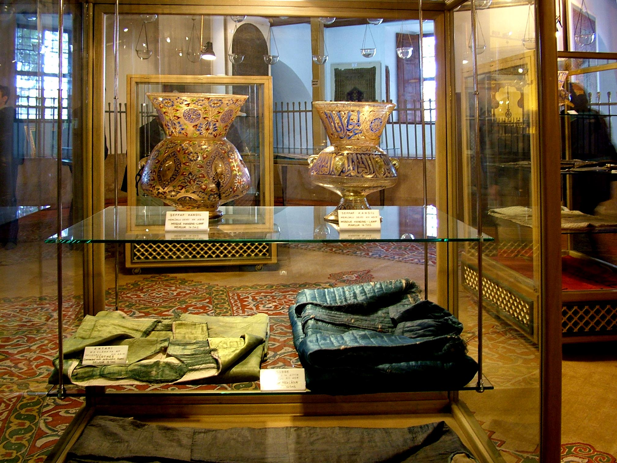 Mevlana Múzeum (Konya, Törökország)